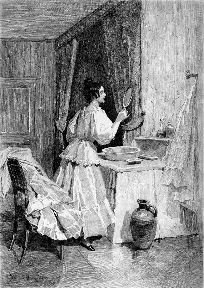 Illustration of Honoré de Balzac's Eugénie Grandet (1834).